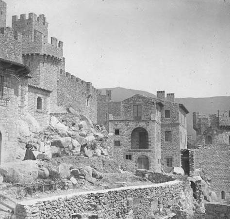 Castell de Requesens. Frederic Bordas i Altarriba (ca. 1890)